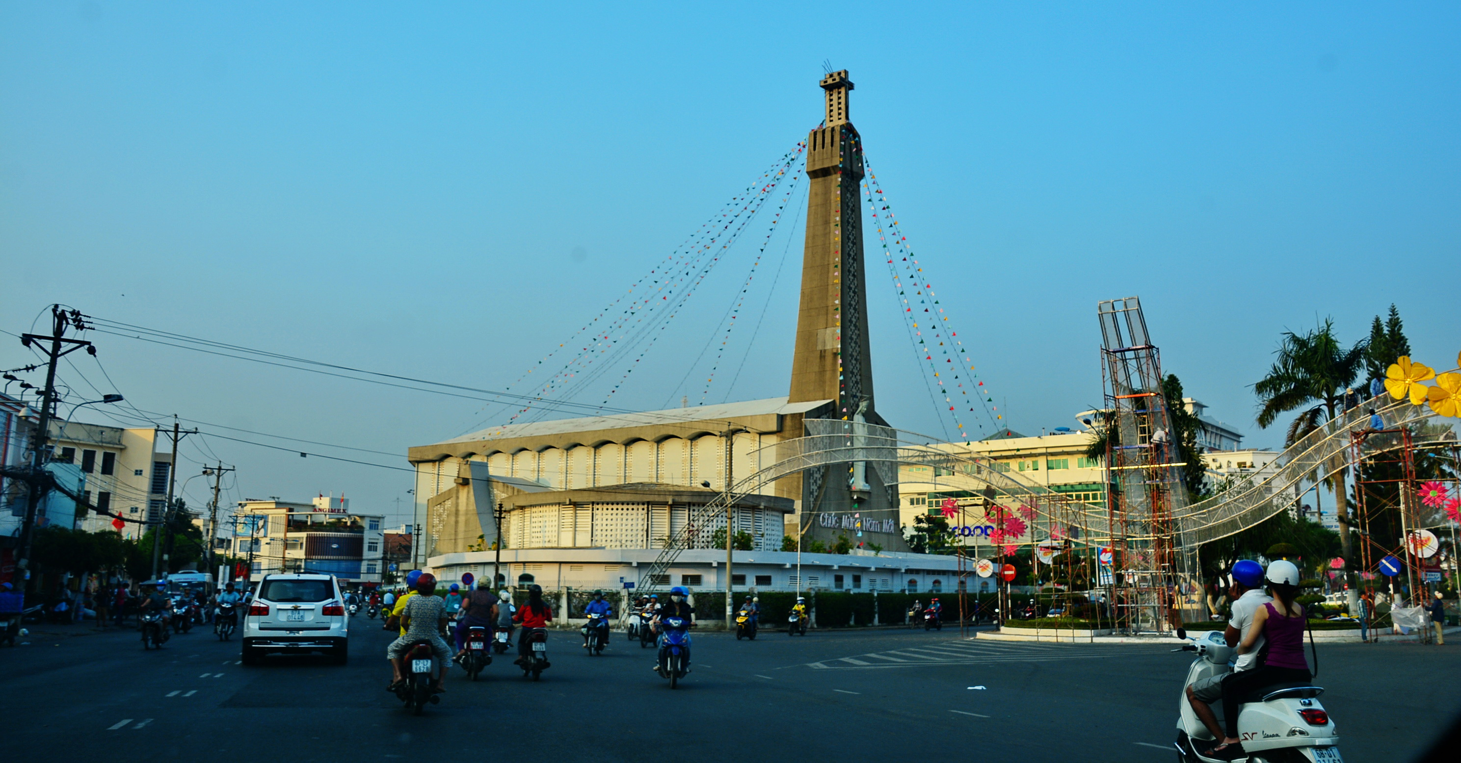 Nhà Thờ Chánh toà Long xuyên-Mỹ Long, tp. Long Xuyên, An Giang, Việt Nam